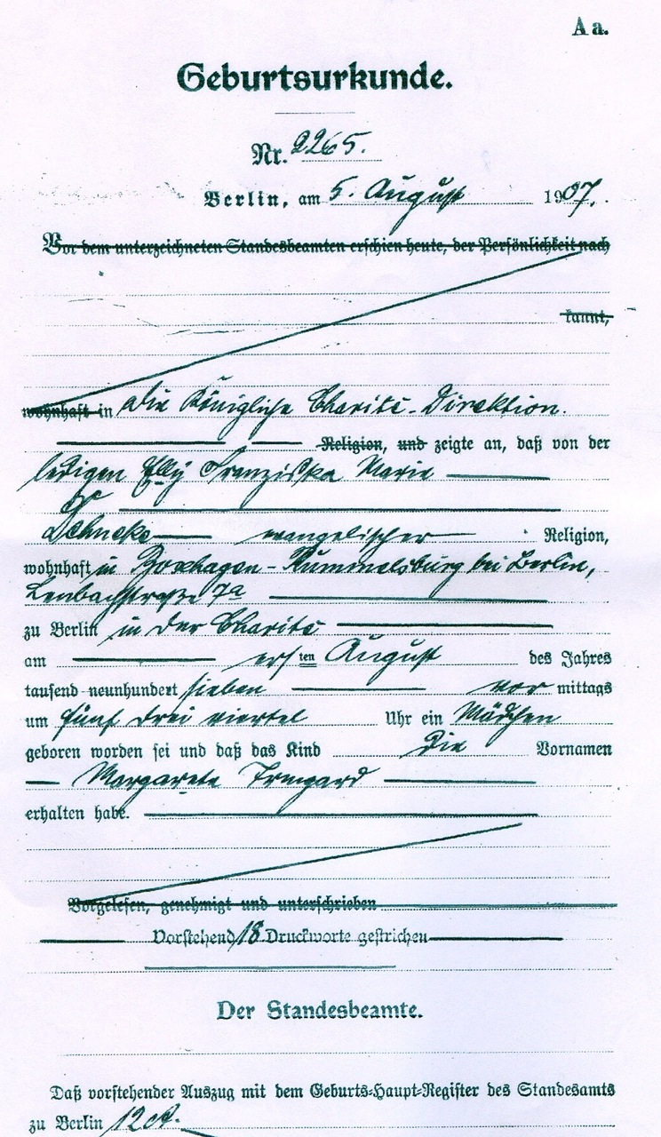 Geburtsurkunde von Margarete Irmgard Kusber, geborene Dehneke, bekannt als Grete Kusber, Widerstandskämpferin in der NS-Zeit